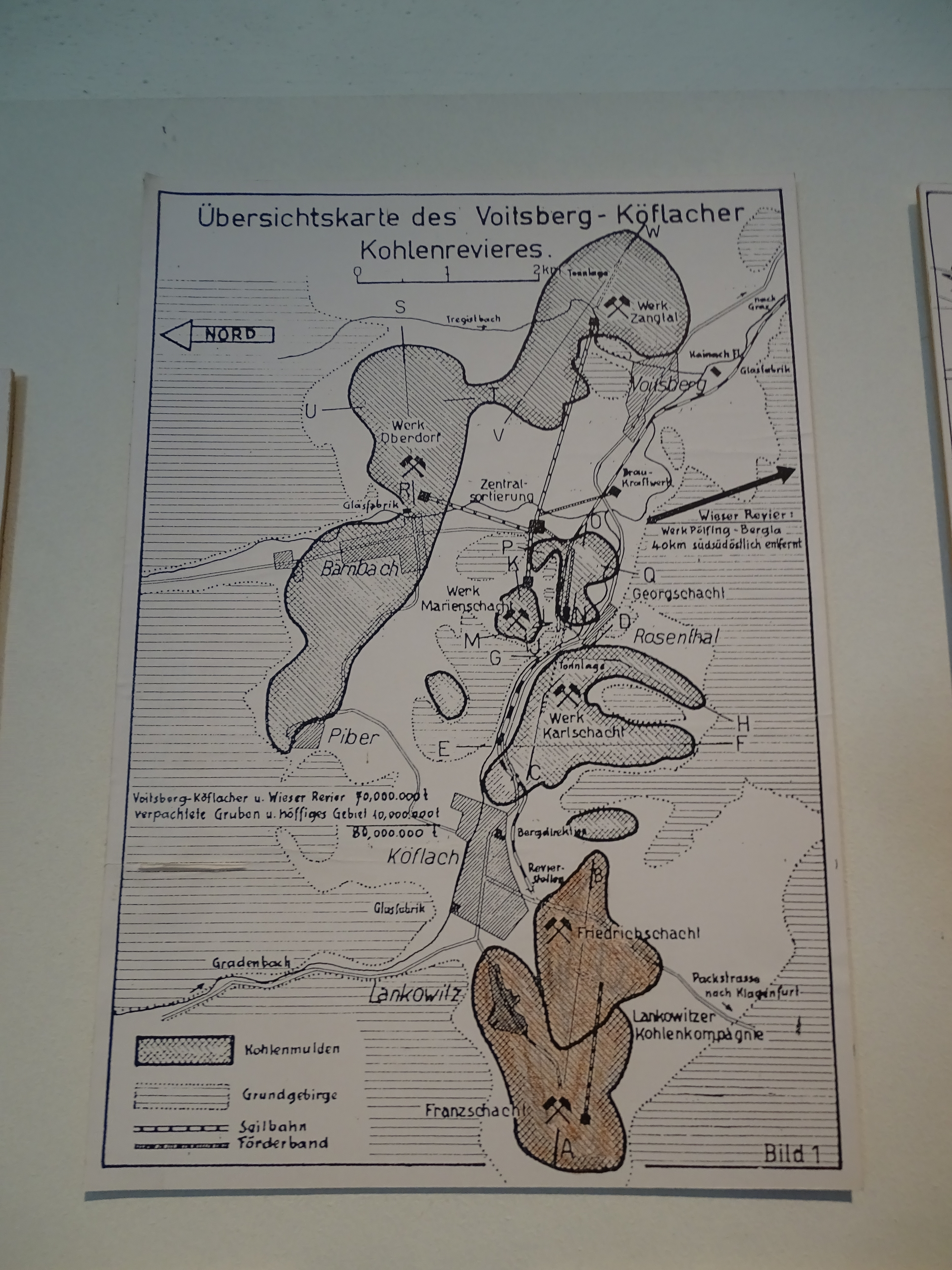 Darstellung des Voitsberg-Köflacher Revier im Schloss Lankowitz beheimateten Ortsmuseum Dieses Bild wurde anlässlich des österreichischen Tags des Denkmals 2018 in der Steiermark eingereicht.